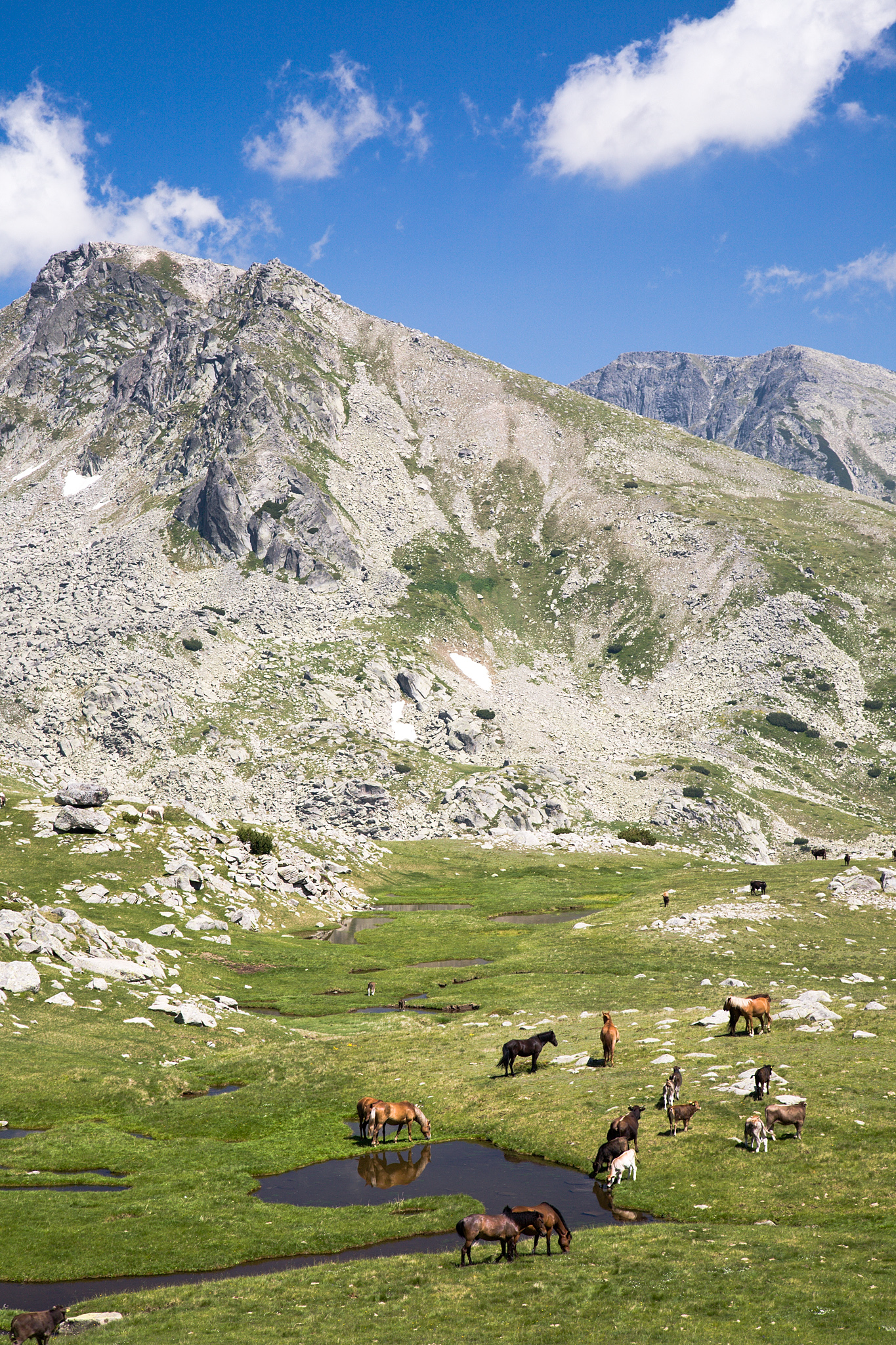 Пирин, Пирин, малко езеро в Спанополския циркус